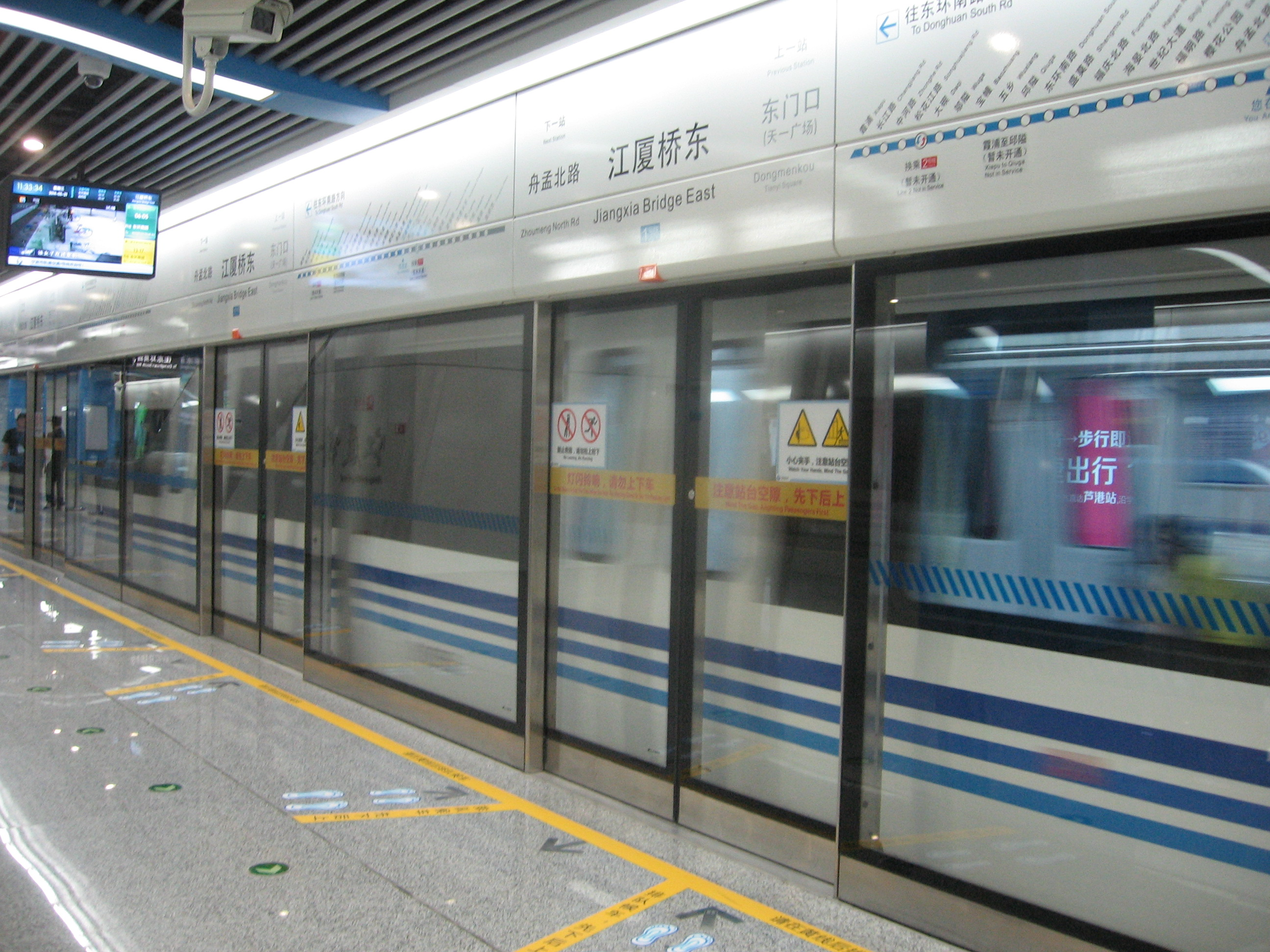 一号线，江厦桥东站